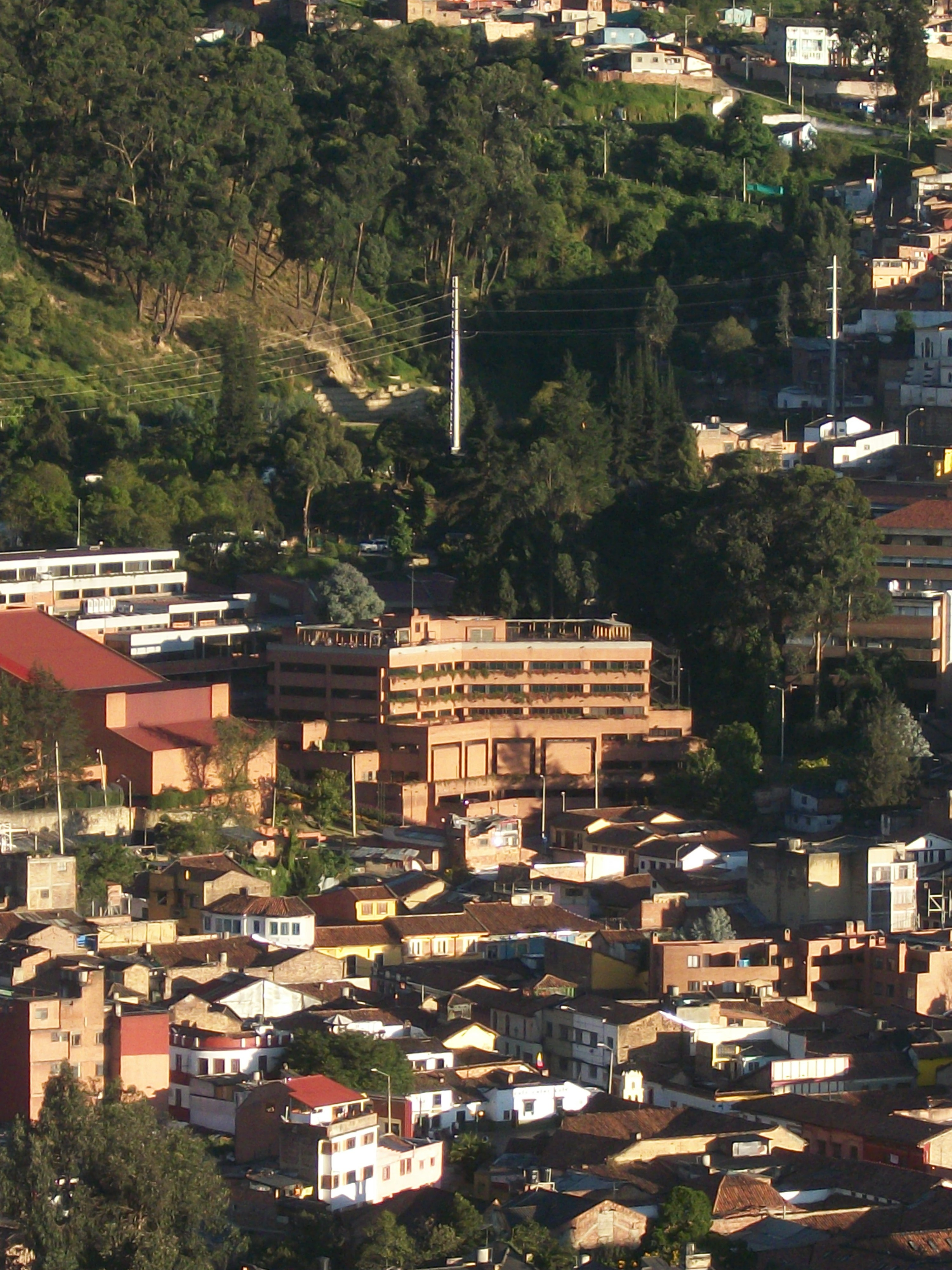 Foto de la universidad Externado desde el edificio Avianca.